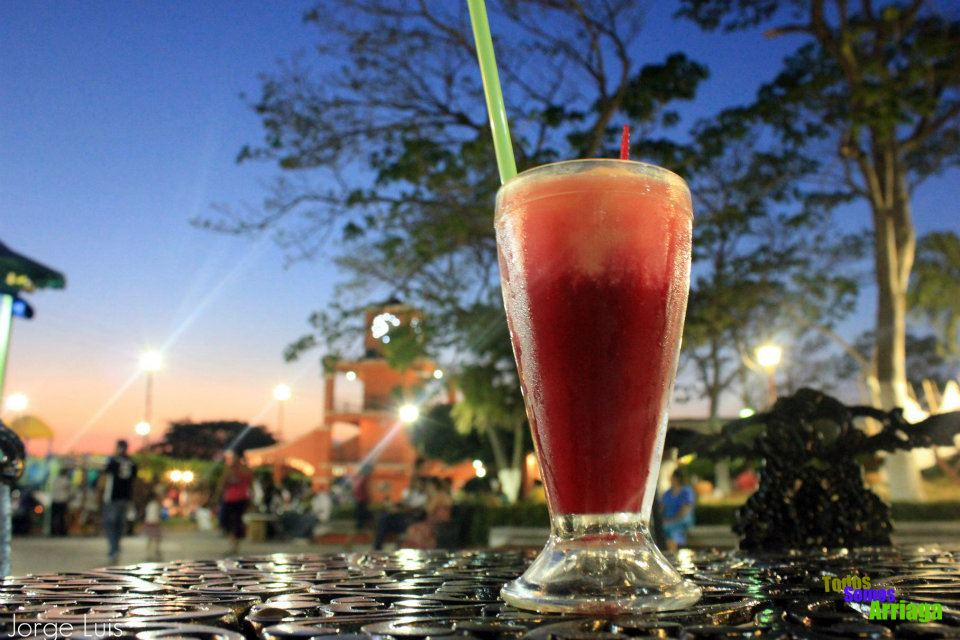 fotografia de Jorge Luis de los Santos Trujillo